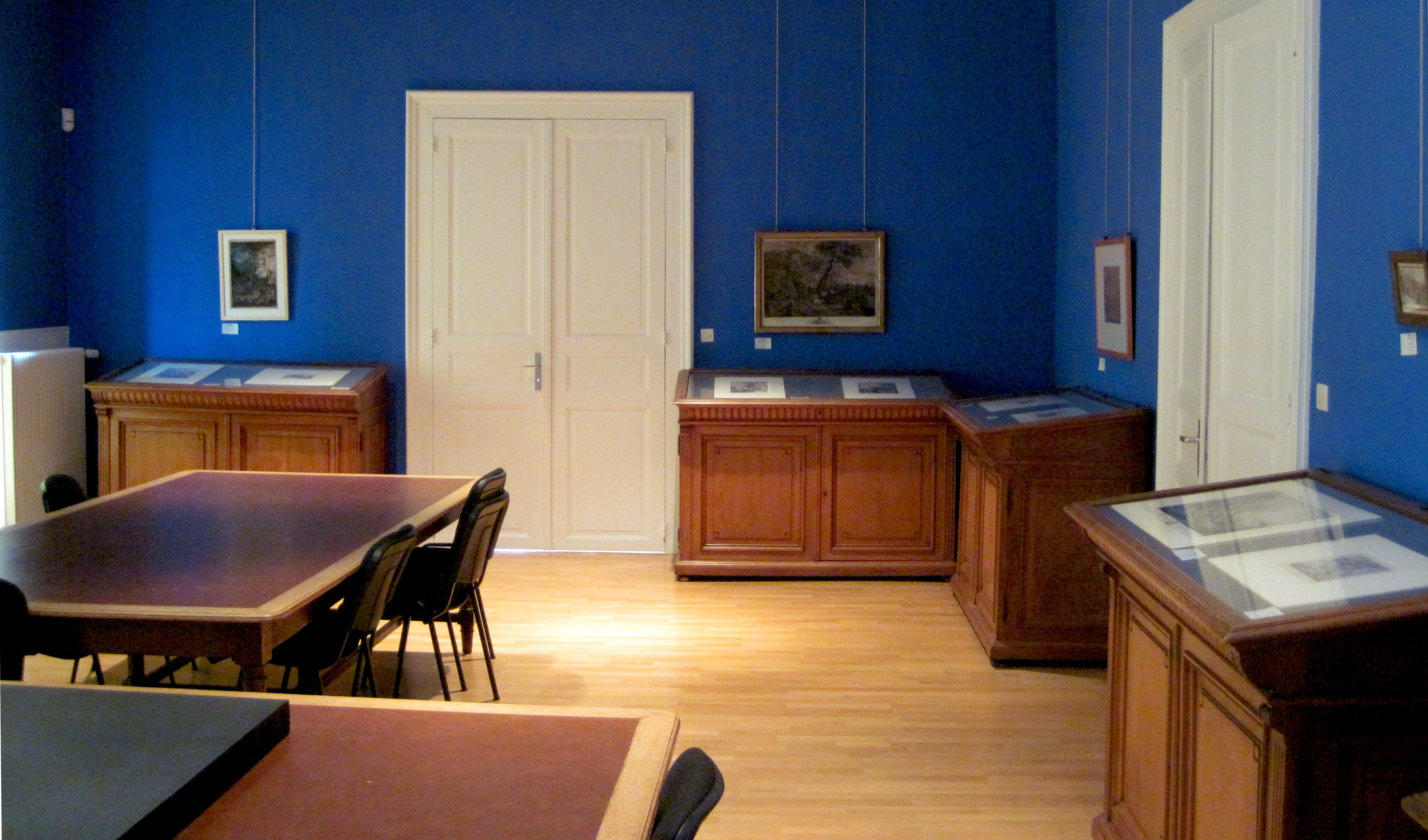 Salle de consultation du Cabinet des Estampes et des Dessins